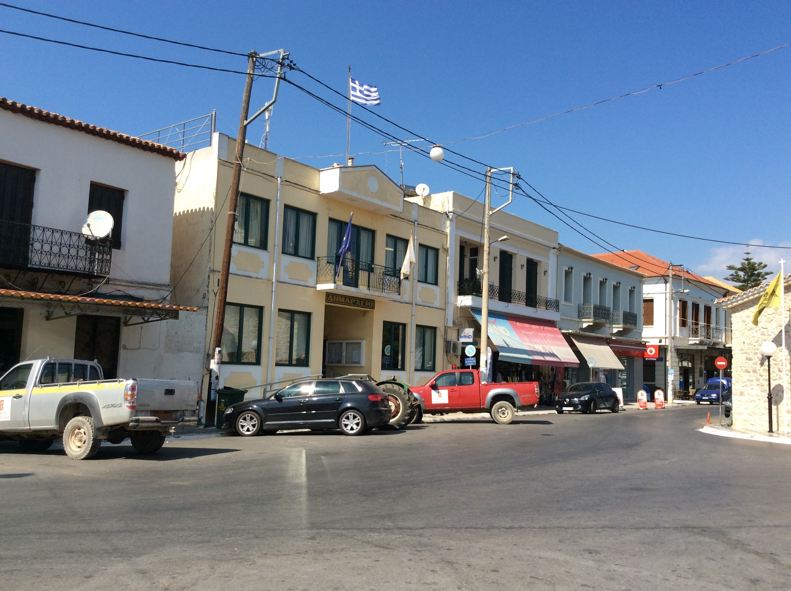 Γαργαλιάνοι Μεσσηνίας. Το κτίριο του παλαιού Δημαρχείου των Γαργαλιάνων.